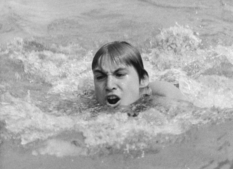 Jürgen Glas ADN-ZB Mittelstädt 11-7-73 Berlin: 24. DDR-Meisterschaften im Sportschwimmen im Freiwasserbecken des Dynamo-Sportforums-Der 17-jährige Jürgen Glas (SC Dynamo Berlin) erreichte über 200 m Brust der Herren mit 2:30,49 min die schnellste Vorlaufzeit und hofft beim Finale auf eine Meisterschaftsmedaille.